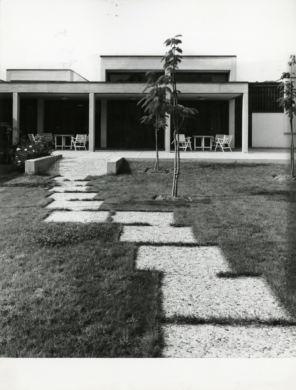 Servizio fotografico : Imola, 1968 / Paolo Monti. - Stampe: 28 : Positivo b/n, gelatina bromuro d'argento/ carta, 18x24. - ((Al verso delle stampe manoscritti i numeri dei negativi corrispondenti: 14768, 14769.14770, 14771, 14772, 14774, 14777, 14778, 14782, 14786, 14787bis, 14801, 14804. - Sul coperchio della scatola iscrizione didascalica manoscritta a pennarello nero: "Milano A". - Occasione: Documentazione dell'Ospedale Psichiatrico, riconvertito dall'architetto Enzo Zacchiroli in Centro diagnostico neuropsichiatrico (1964-1969). - Fonte: Agenda di Paolo Monti: Monti/ 3 aprile 1966 - 9 marzo 1971/ 12421-16823 (1966-1971), presso Archivio Paolo Monti. - Fonte: Fattura di Paolo Monti: IV. Commesse/ Fattura/ Riprese fotografiche ospedale psichiatrico di Imola (1969/02/10), presso Archivio Paolo Monti. 20 riprese Linhoff 10x12 b/n, 20 riprese idem, varianti delle precedenti, 40 ingrandimenti 24x30, 8 fogli 24x30 provini a contatto